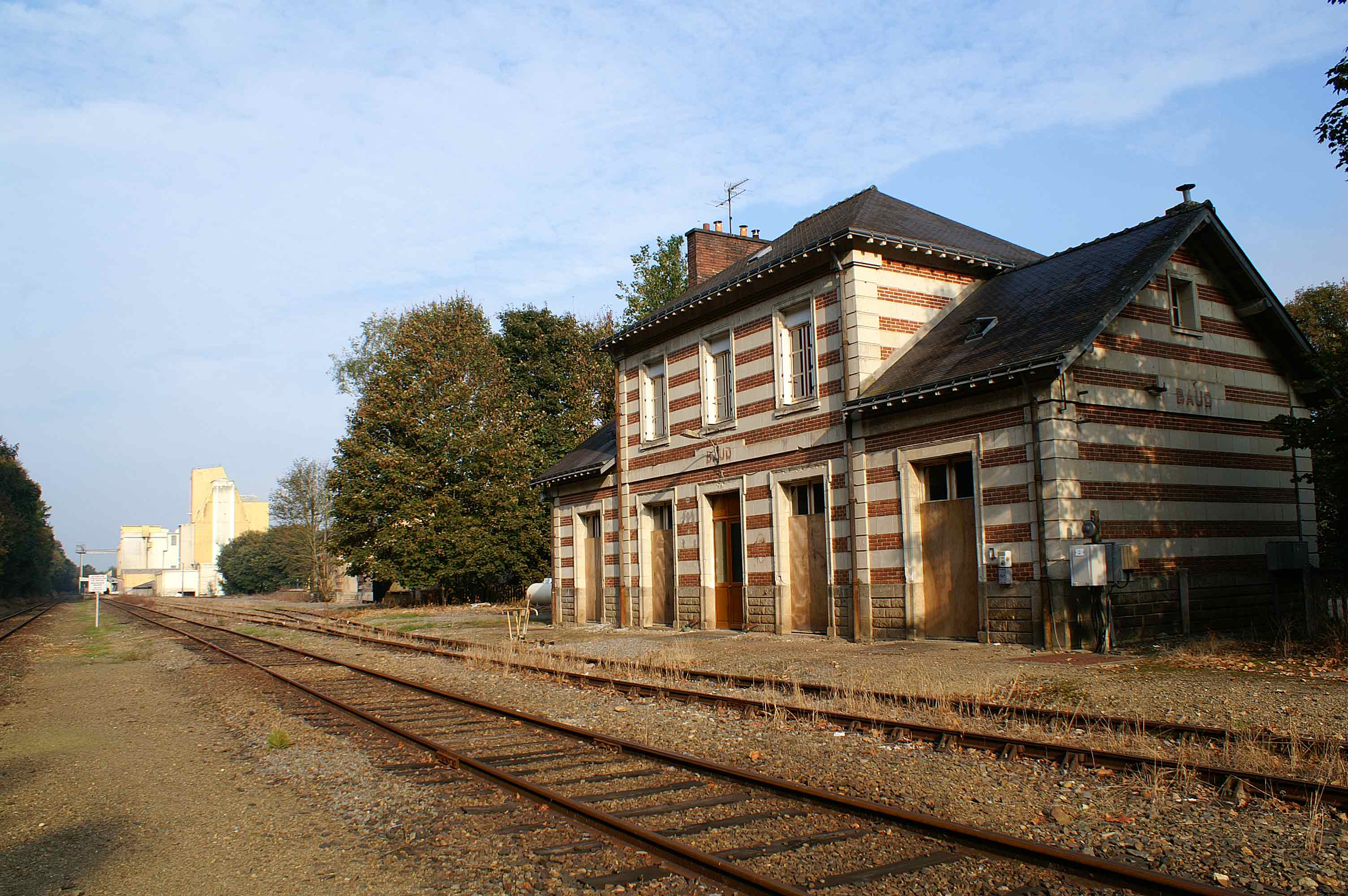 Gare de Baud, bâtiment voyageur et plateforme marchandise, la halle est derrière les arbres avant l'usine Unicopa (au fond) qui affrête des trains de transport de céréales.